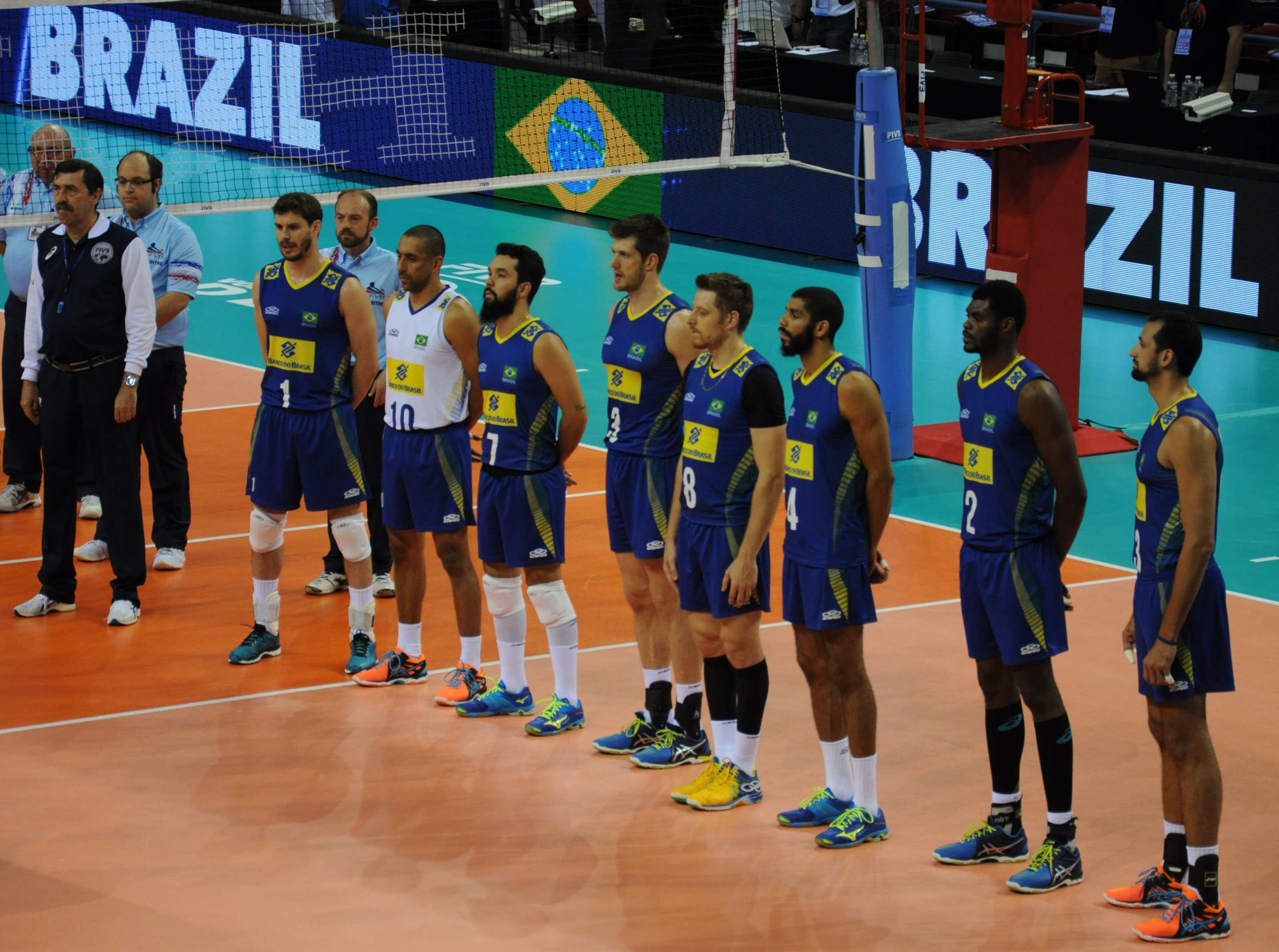 Une partie de l'équipe de Volley-Ball brésilienne lors de la phase de poules de la ligue mondiale